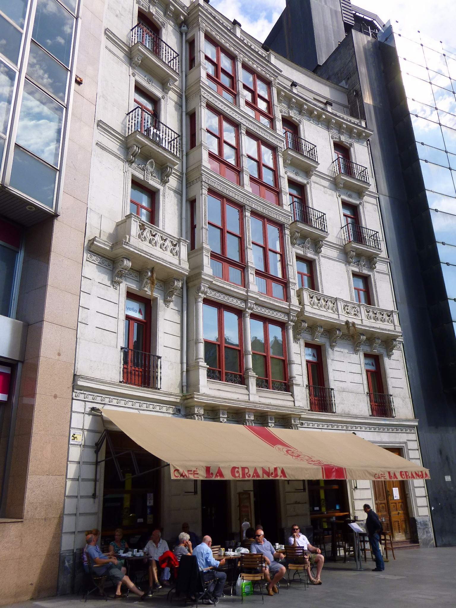 Bilbao - Café La Granja